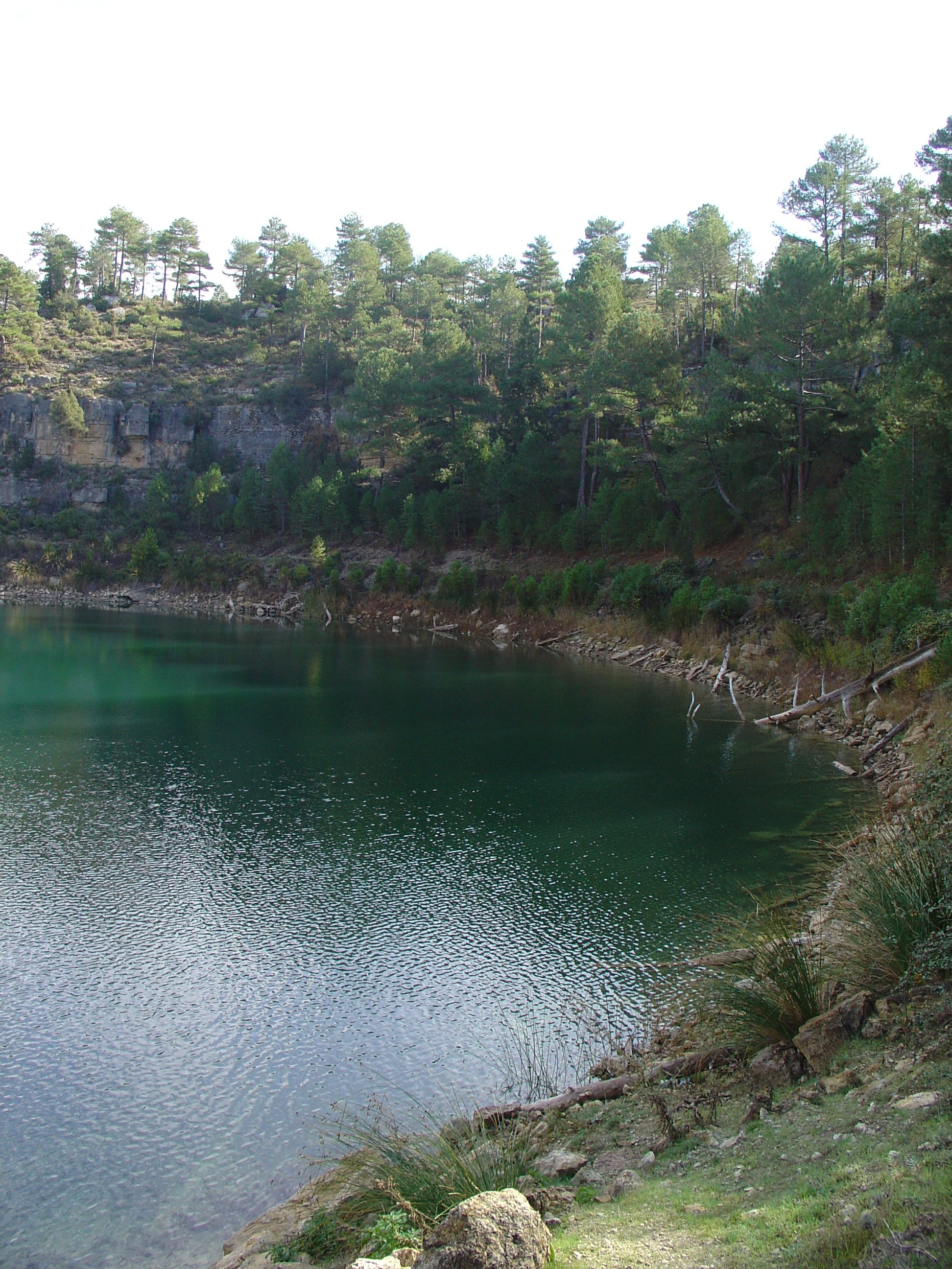 Torca de la novia, Las Torcas, Cuenca, España